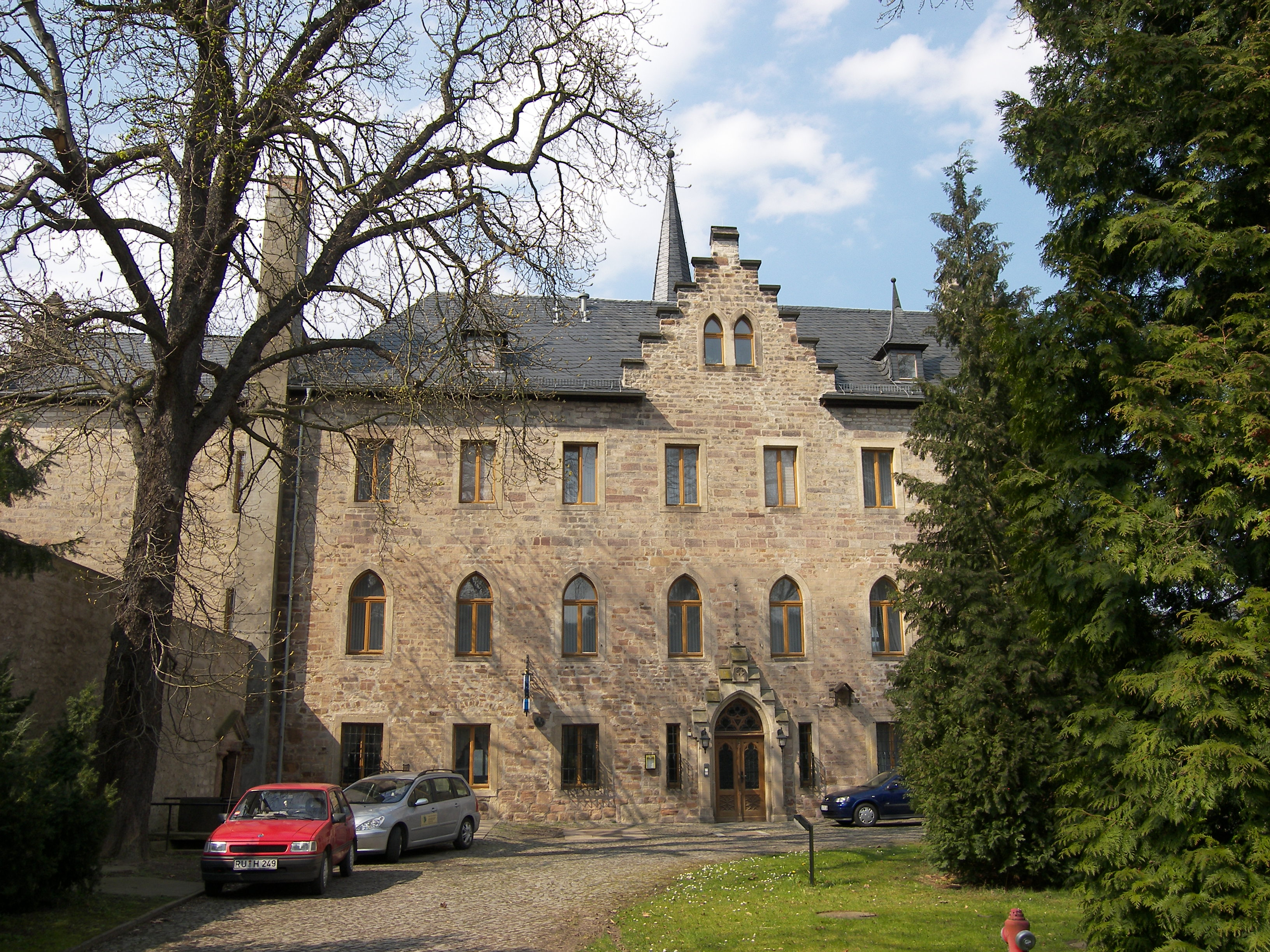 Südseite der Weißenburg in Uhlstädt-Kirchhasel